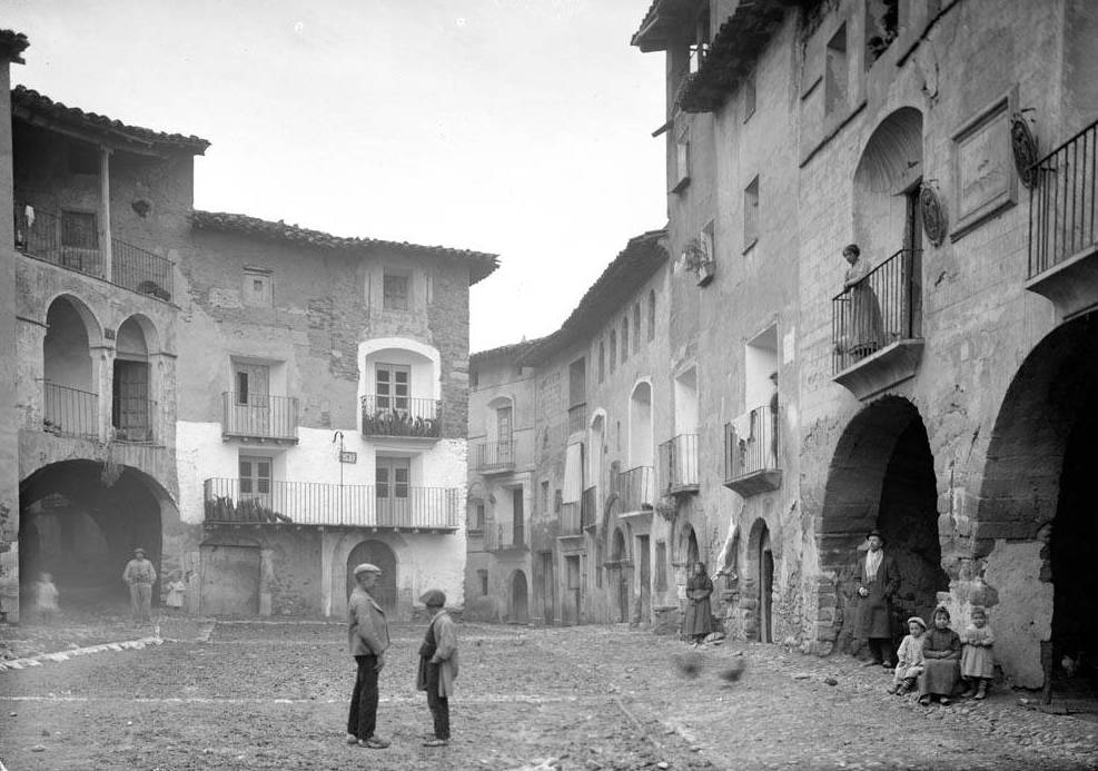 Imatge